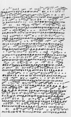 Стихира на целование плащаницы. (ГИМ. Епарх. 181. Л. 122)